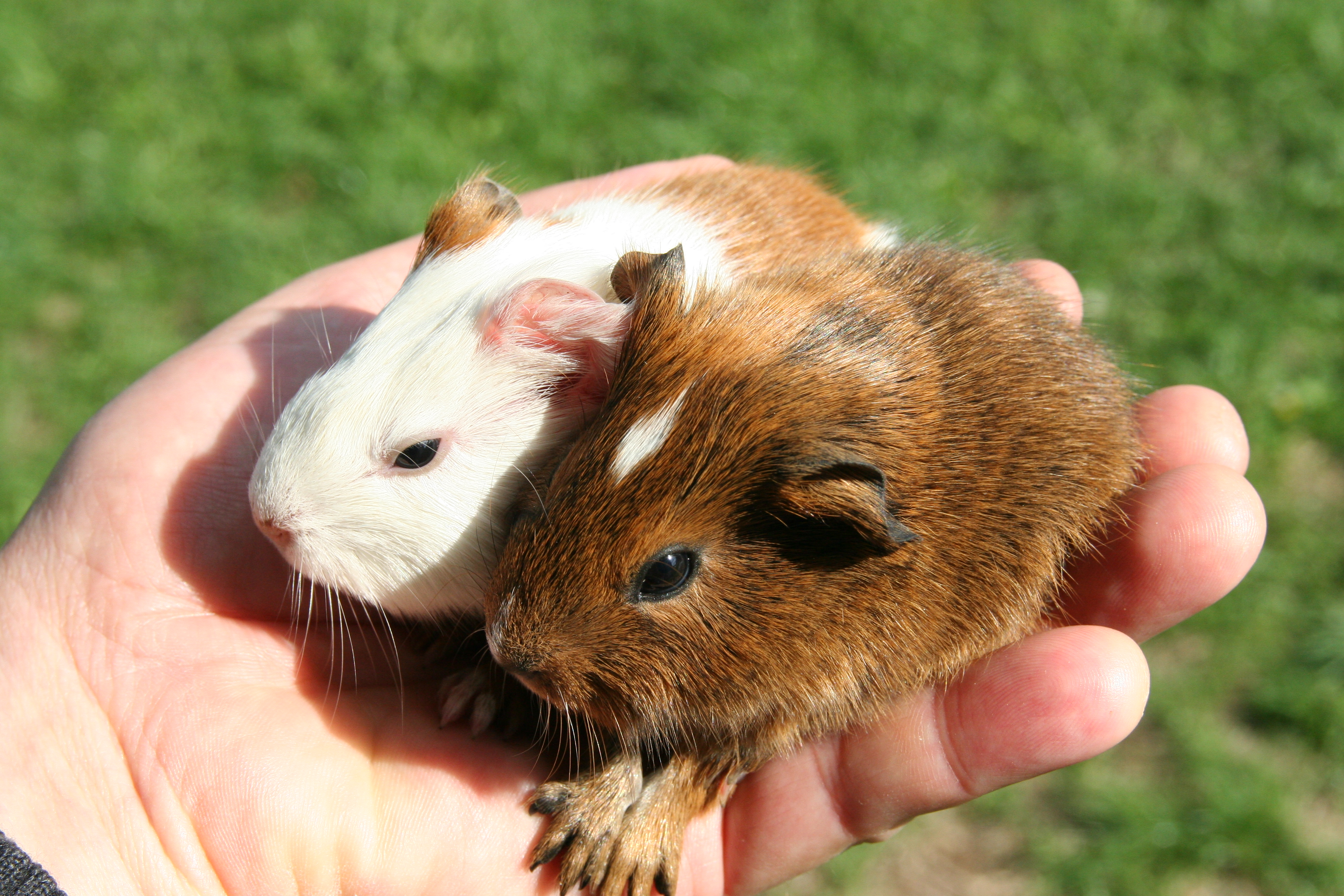 Cochons d'inde de 24H.